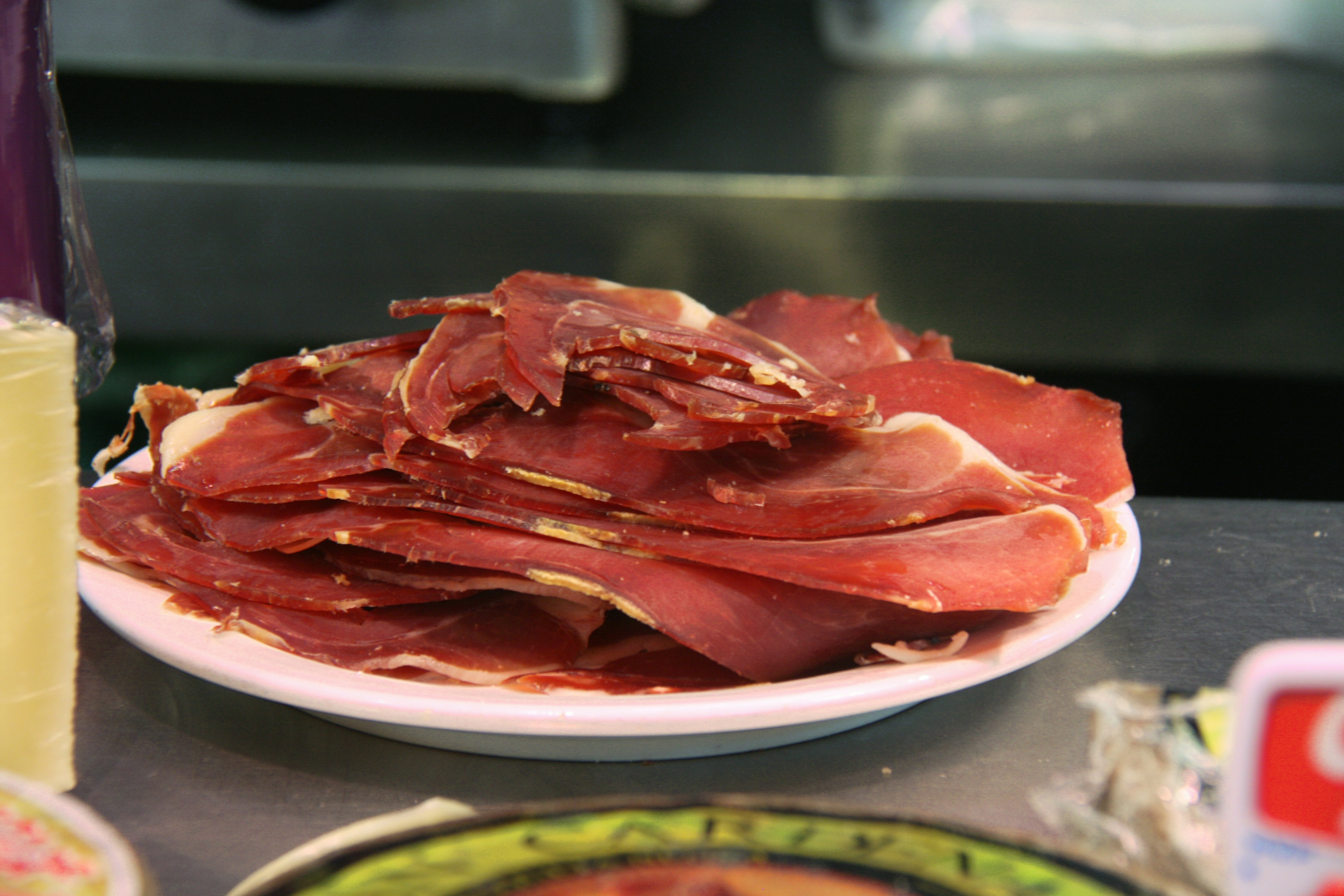 Lonchas de jamón cortadas por medios mecánicos (se ve la regularidad del corte)